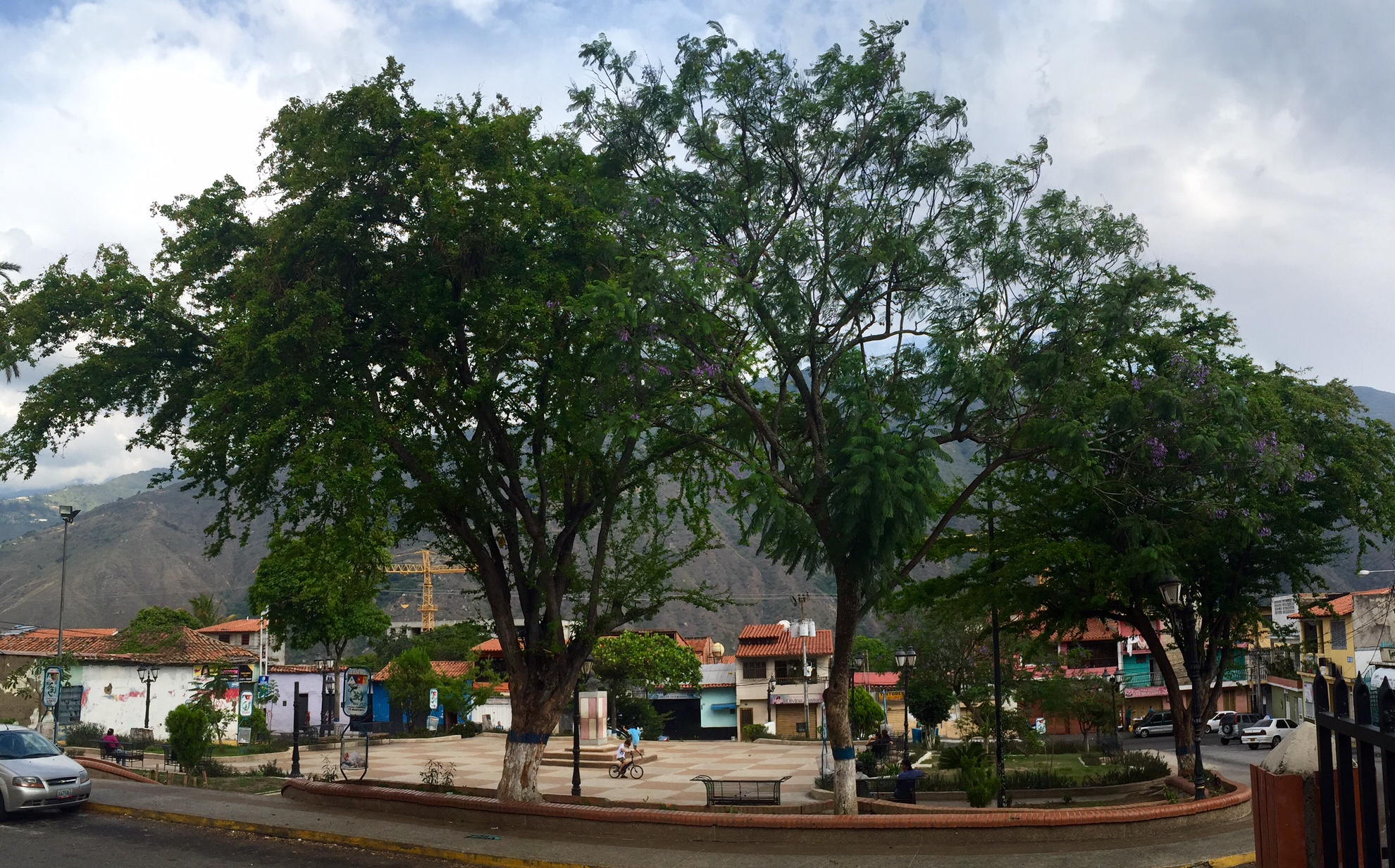 Plaza Montalbán de Ejido, estado Mérida, Venezuela.